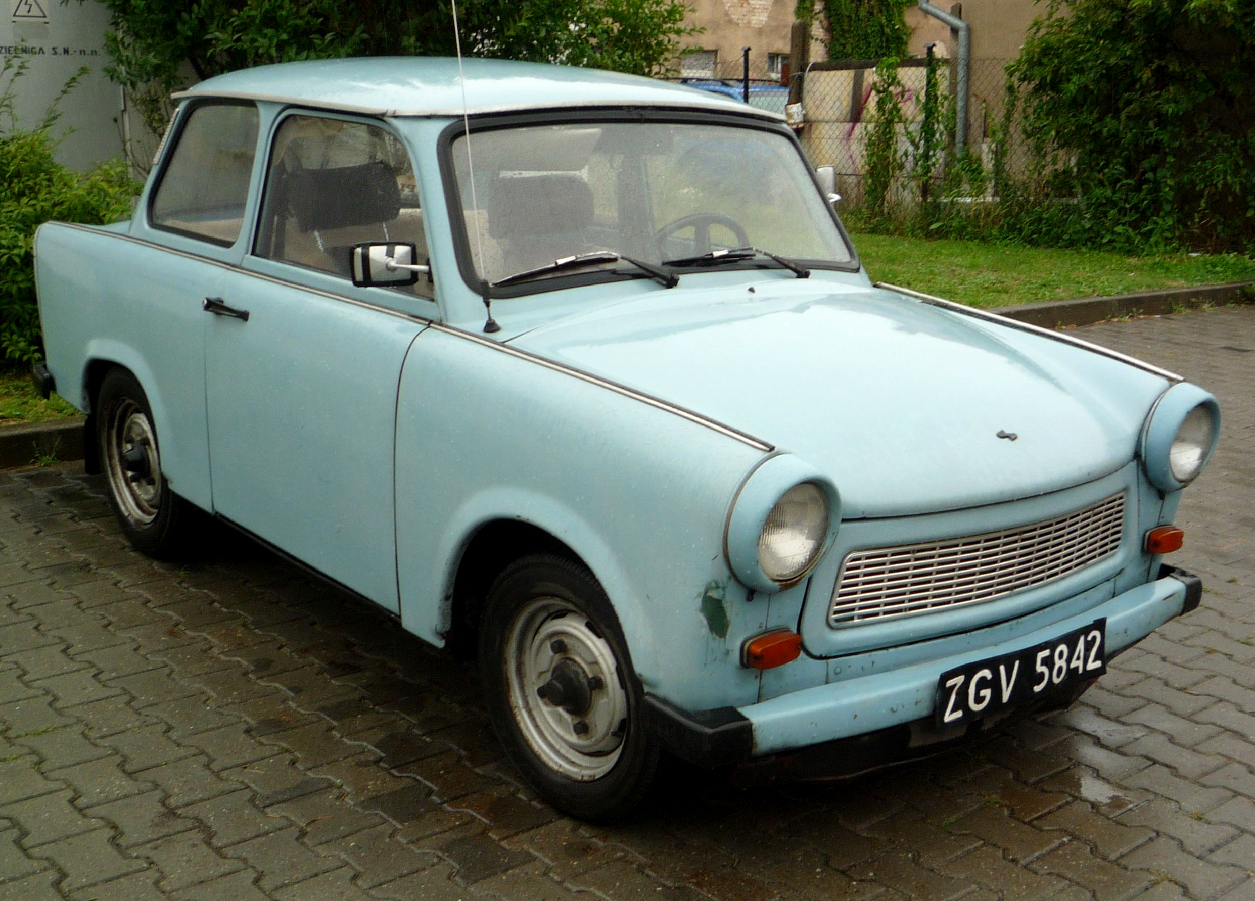 Trabant 601 w Słubicach.